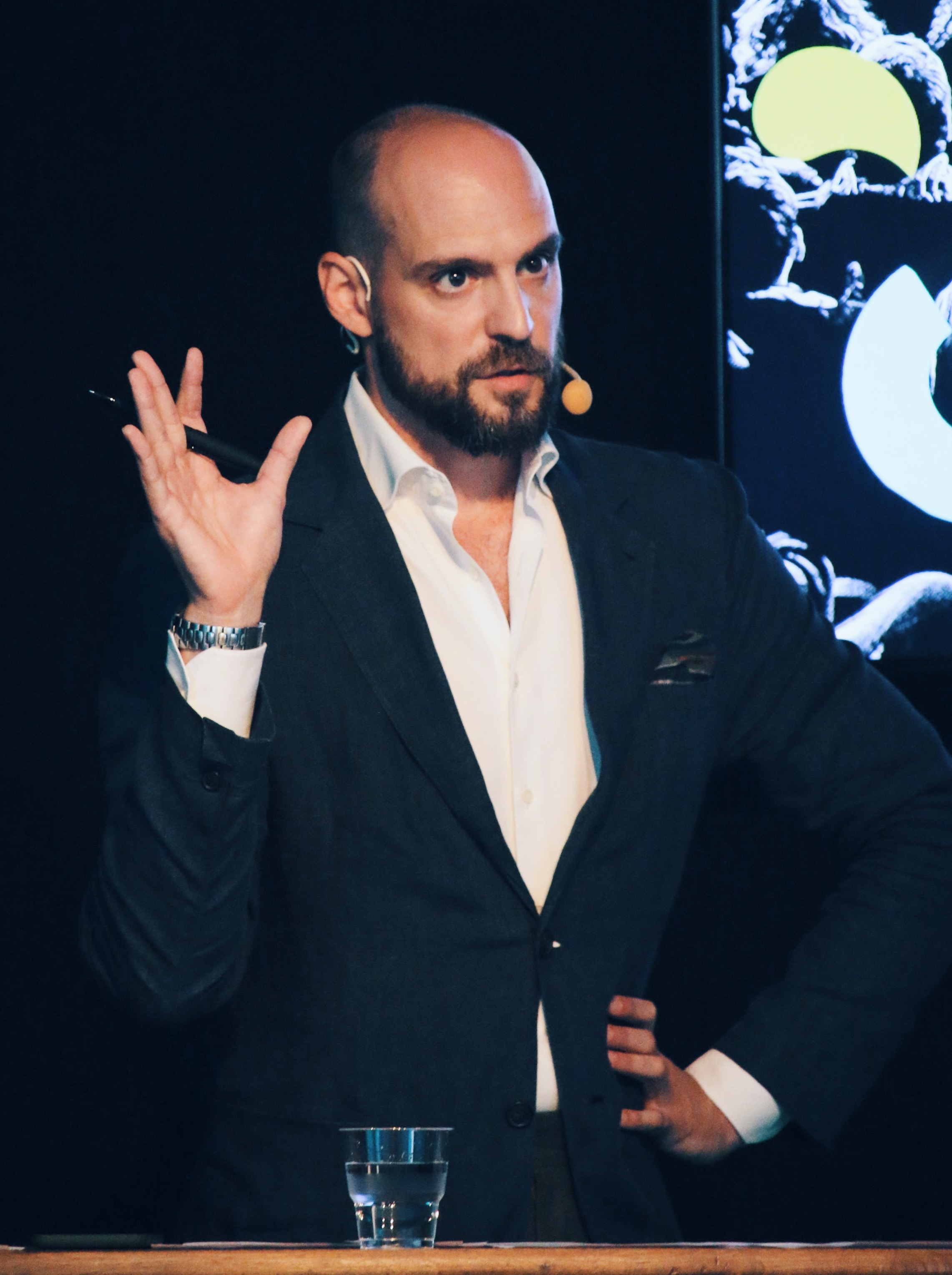 David Orlic modererar ett samtal under Almedalsveckan 2019